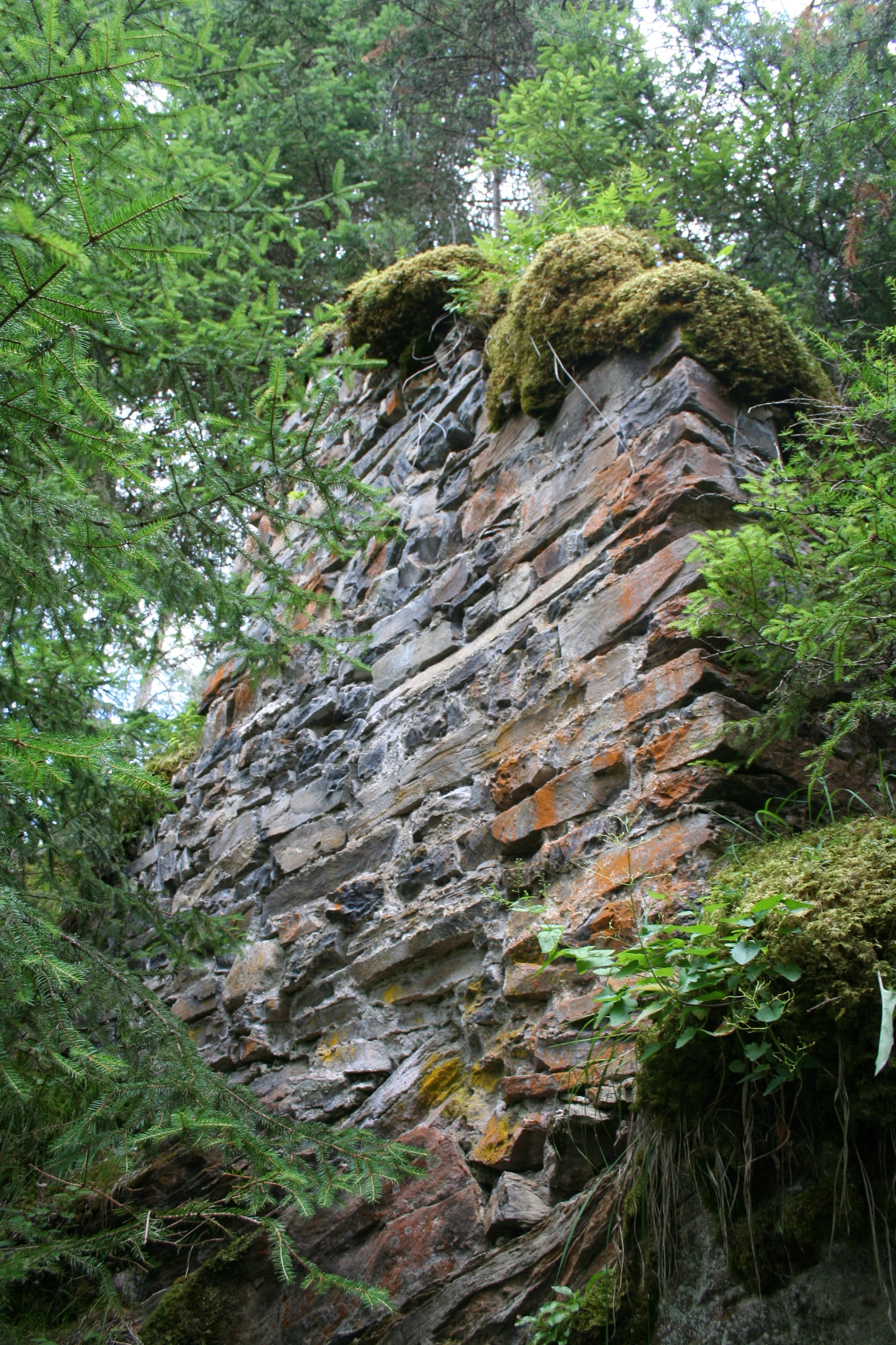 nördliche Mauerecke